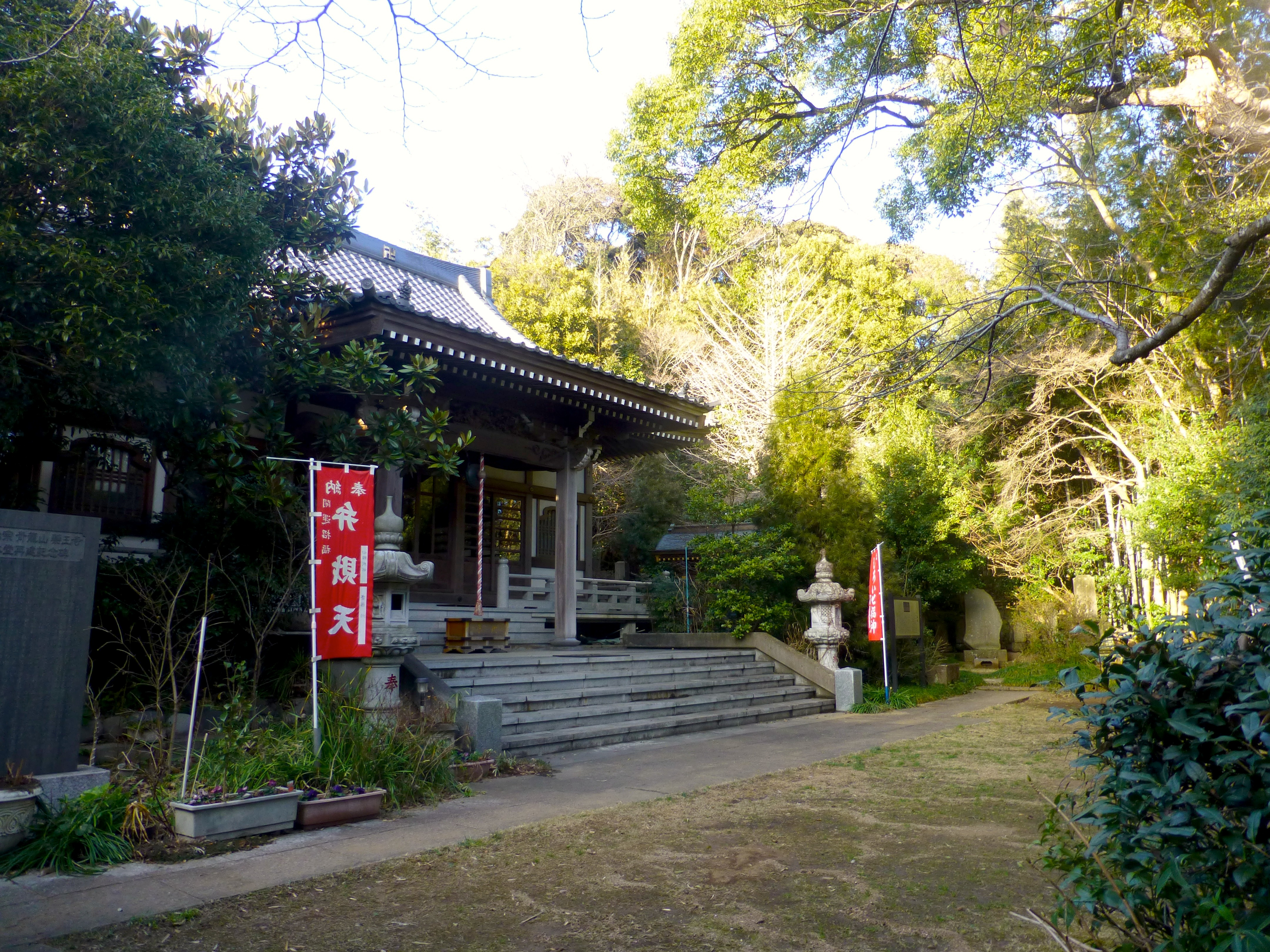 薬王寺（やくおうじ）は、千葉県白井市清戸にある天台宗の寺院。(Yakuou-ji is a temple in Shiroi, Chiba)